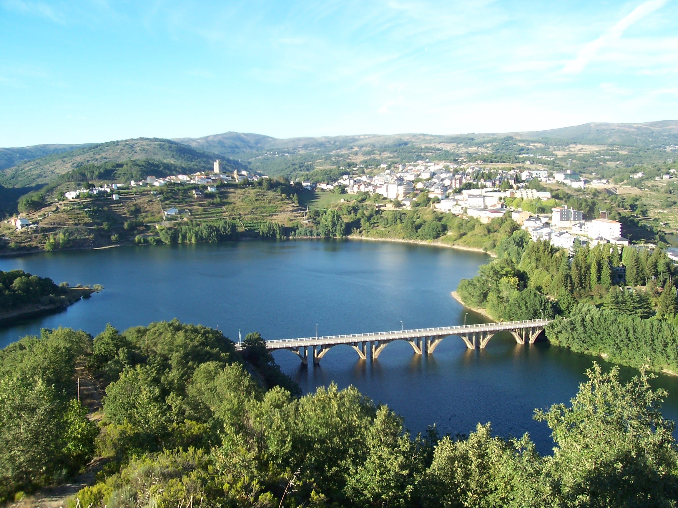 Viana do Bolo - desde o mirador de San Cibrao. Galiza